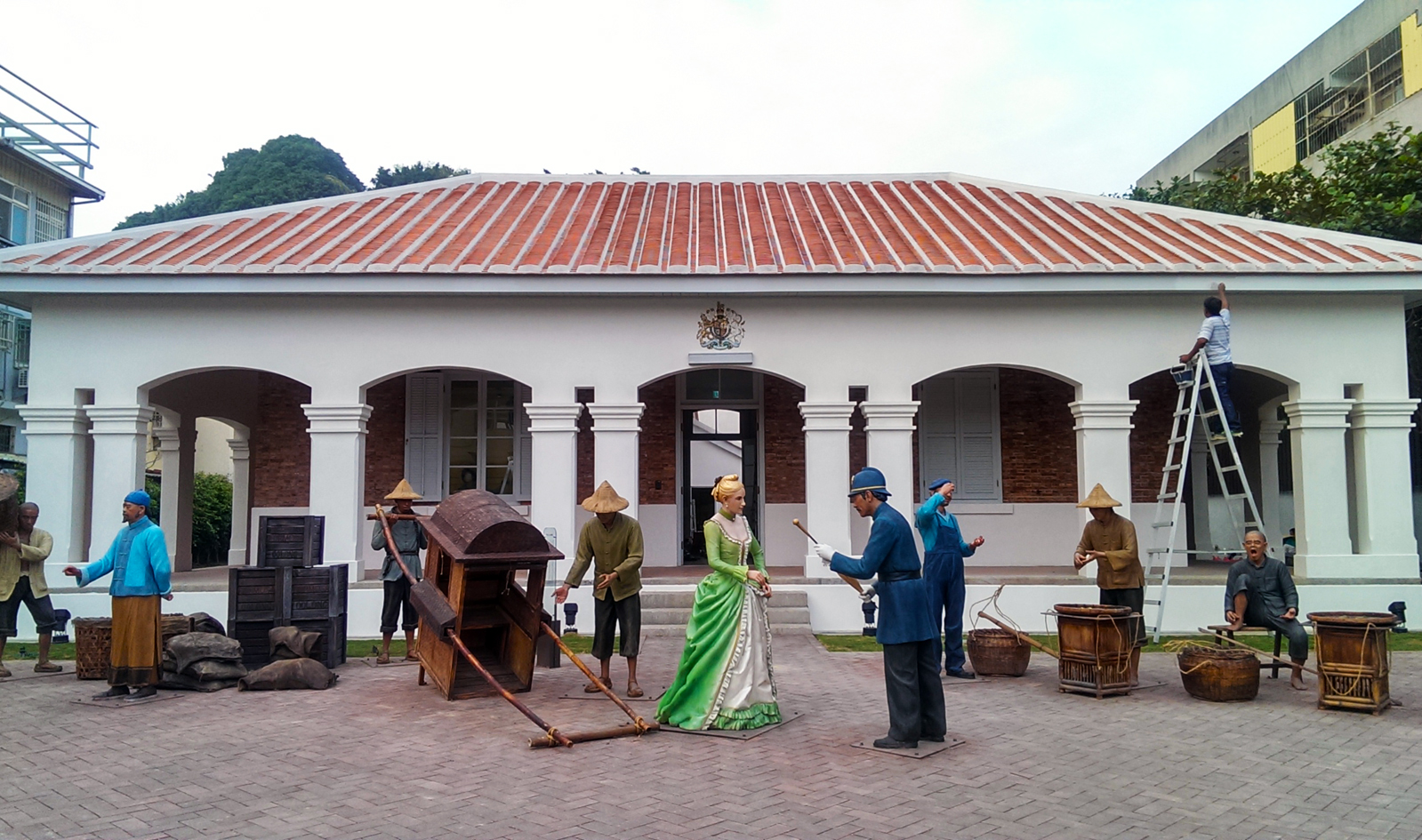 中文（台灣）: 打狗英國領事館